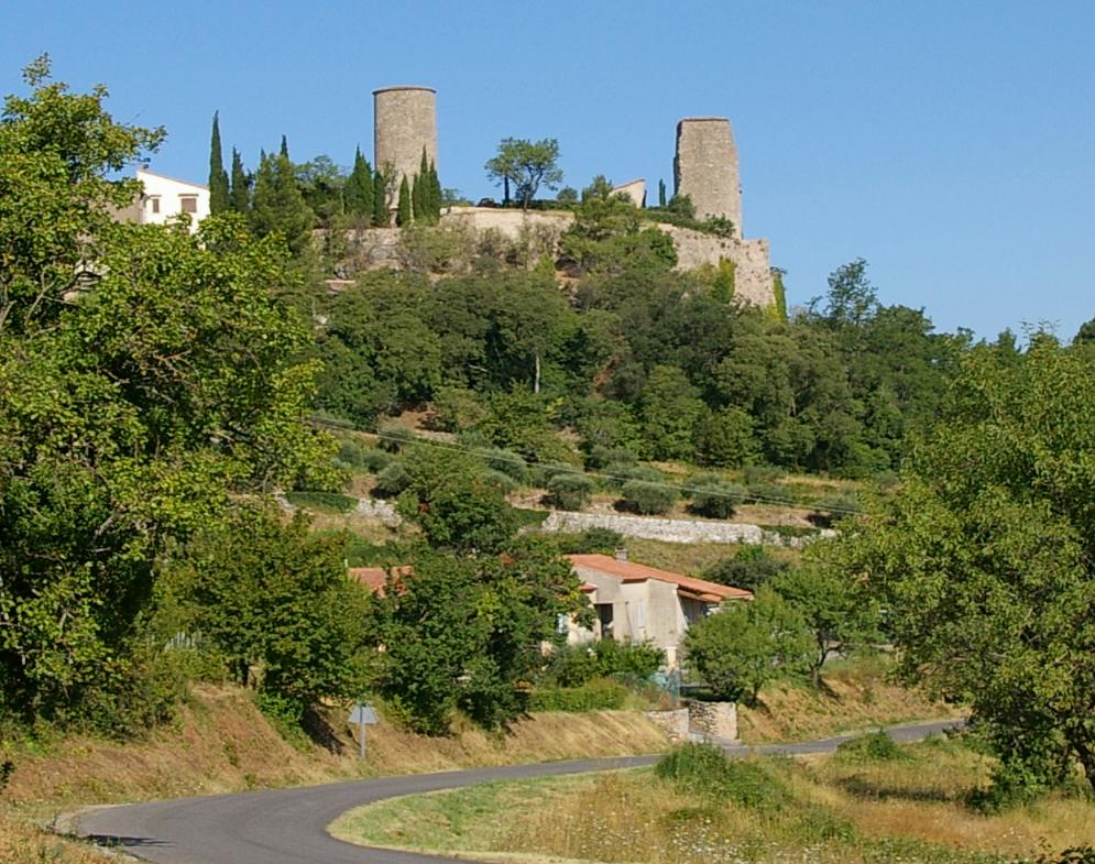 Château de Pontevès